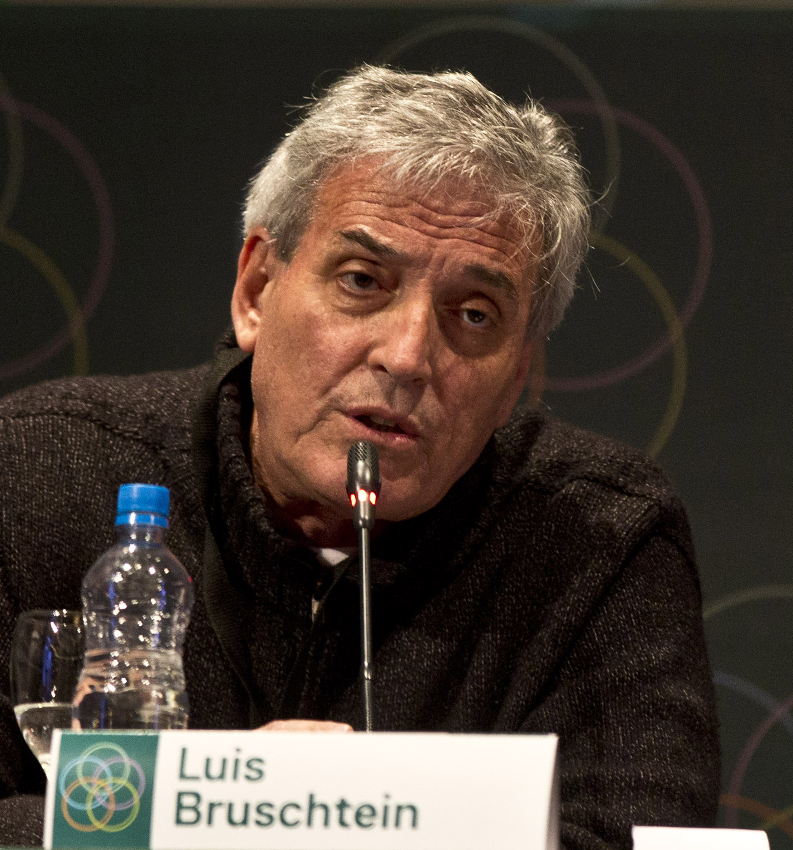 San Miguel de Tucumán, 7 de julio de 2015 - En el marco del “Foro Nacional y Latinoamericano por una Nueva Independencia” que se lleva a cabo en el Teatro San Martín, se realizó la mesa “Pensar la Argentina entre Bicentenarios” con la presencia de José Pablo Feinmann, Eduardo Jozami, Hugo Yasky, Dardo Scavino y Luis Bruschtein. Fotos: Mauro Rico / Ministerio de Cultura de la Nación.